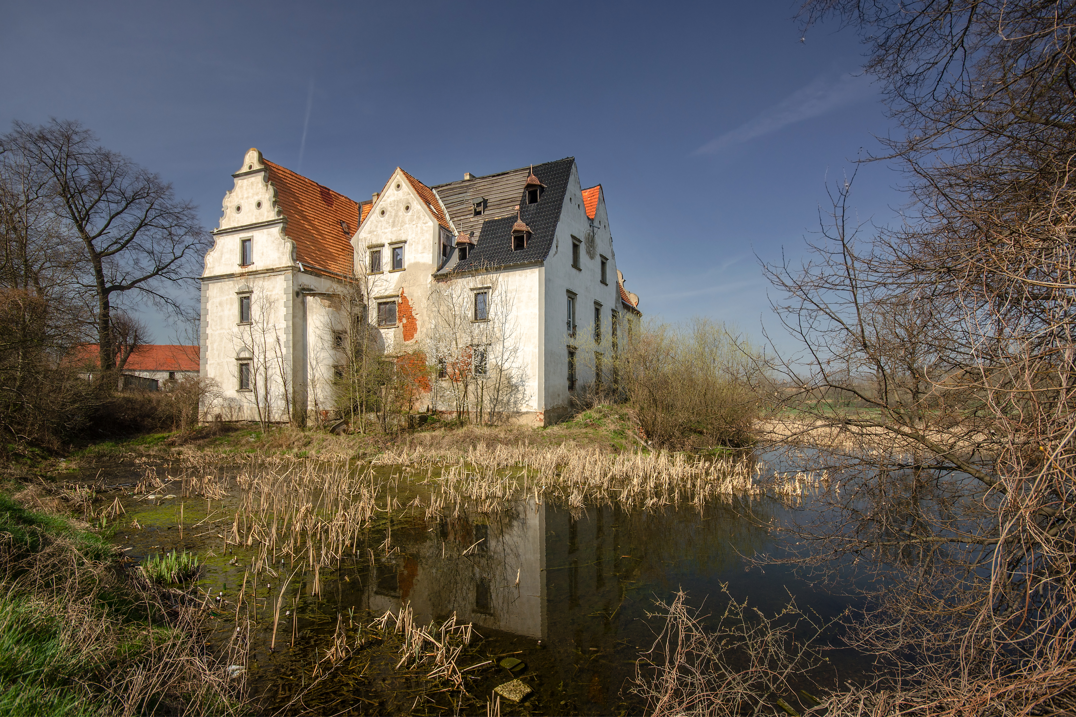 Lubień 4, pałac, 1607, 1700, XX